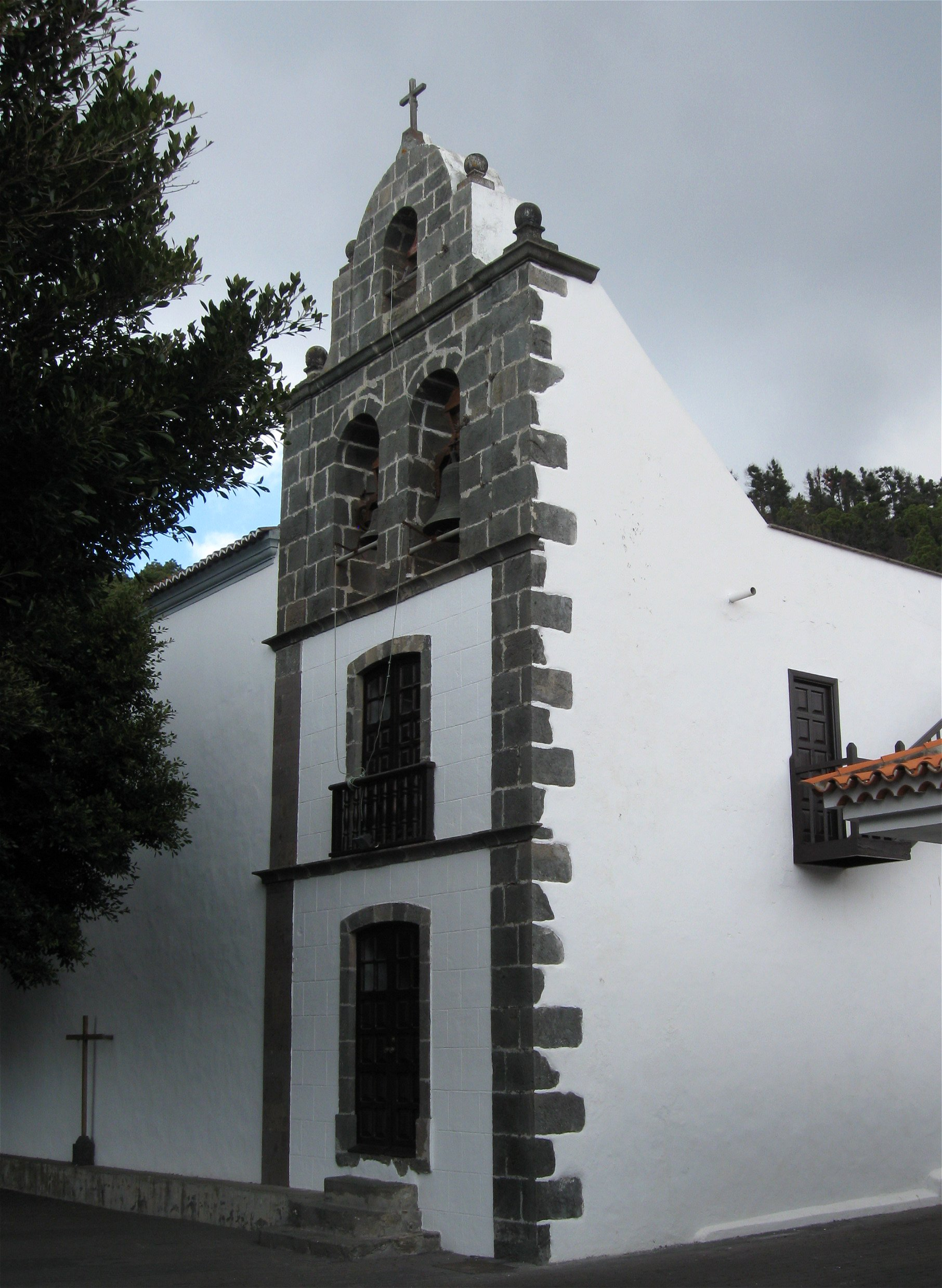 Iglesia de San Antonio Abad, Fuencaliente, La Palma